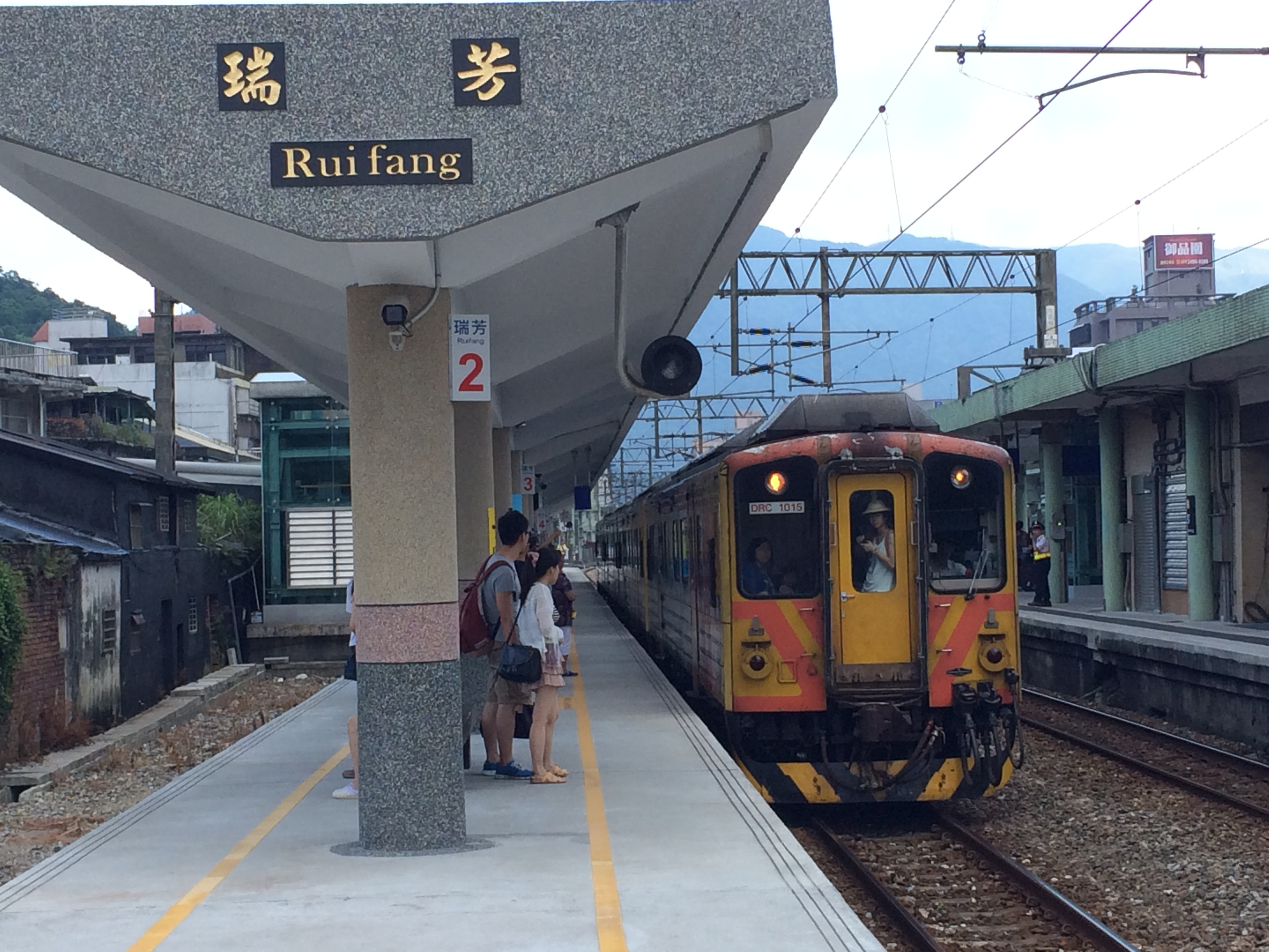 停靠在瑞芳車站的DRC1015